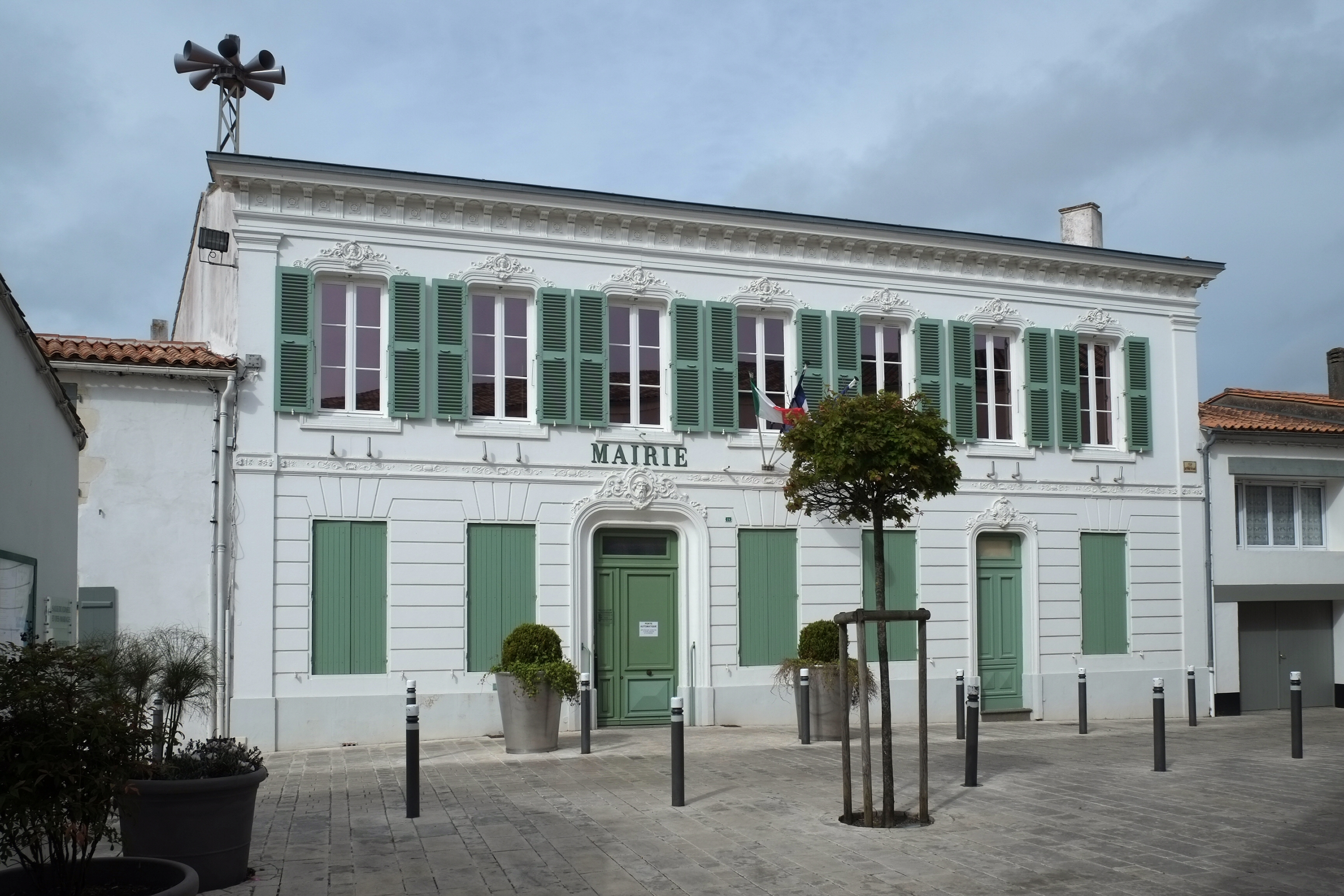 Mairie Le Bois-Plage-en-Ré Charente-Maritime France